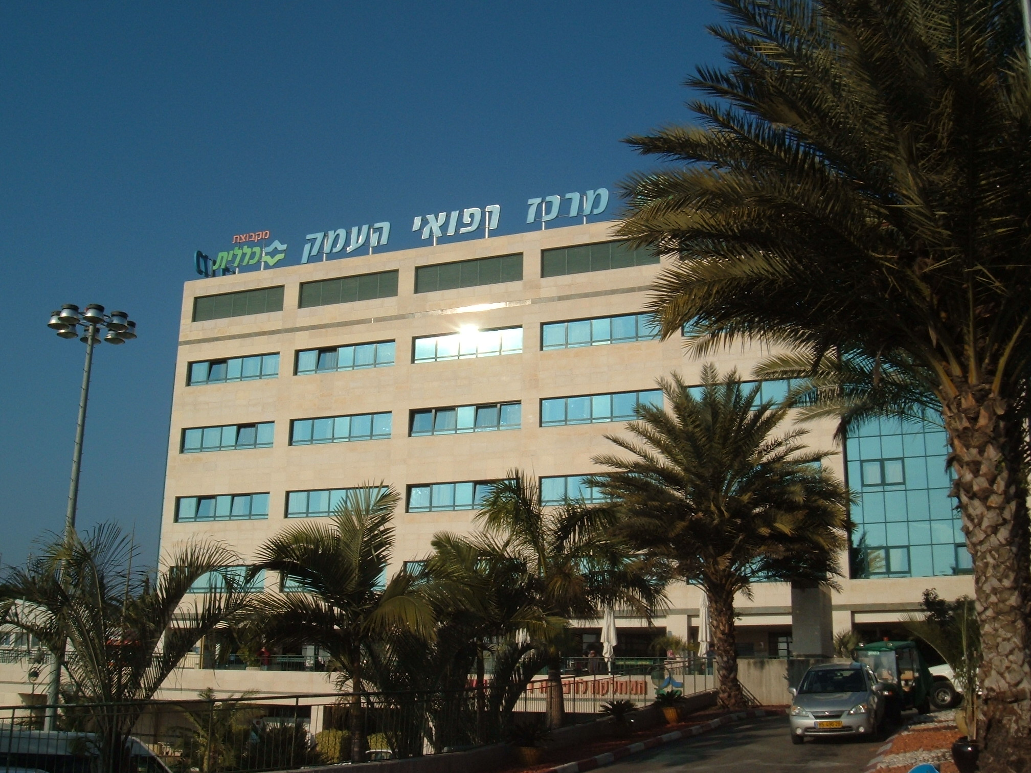 Haemek hospital, Afula, Israel בית החולים העמק בעפולה